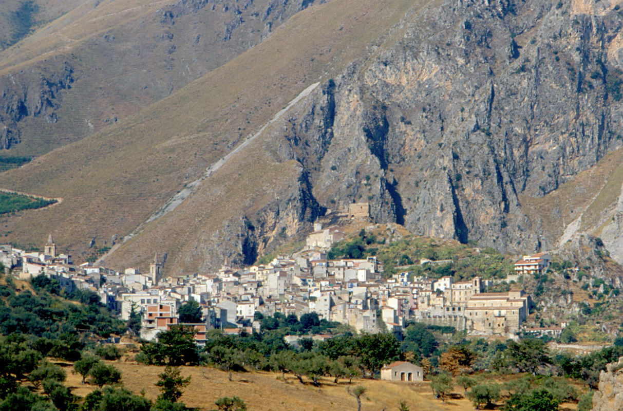 Isnello, provincia di Palermo, Italy